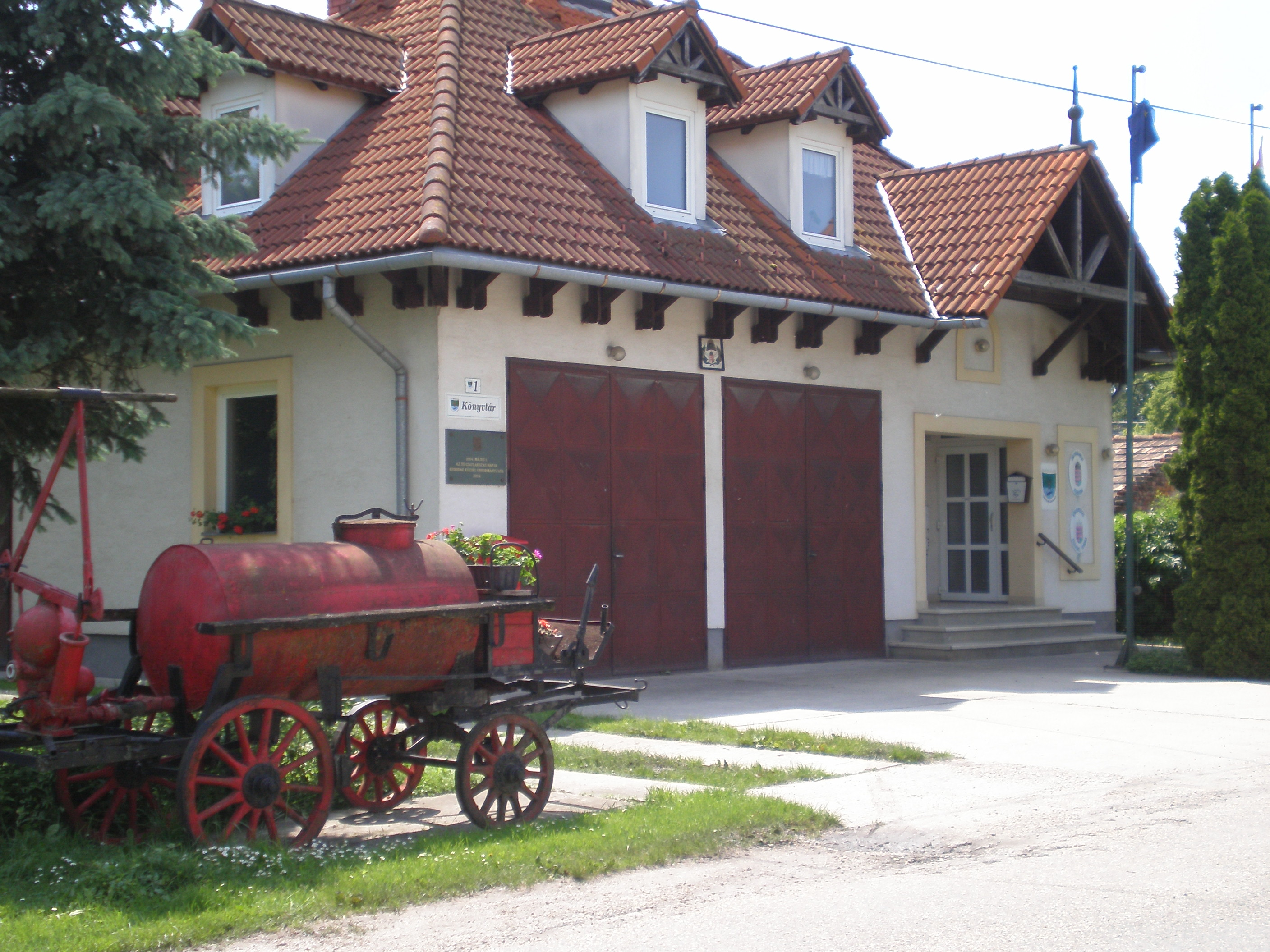 A könyvtár és a tűzoltóság épülete Kisbodakon (Győr-Moson-Sopron megye, Magyarország)